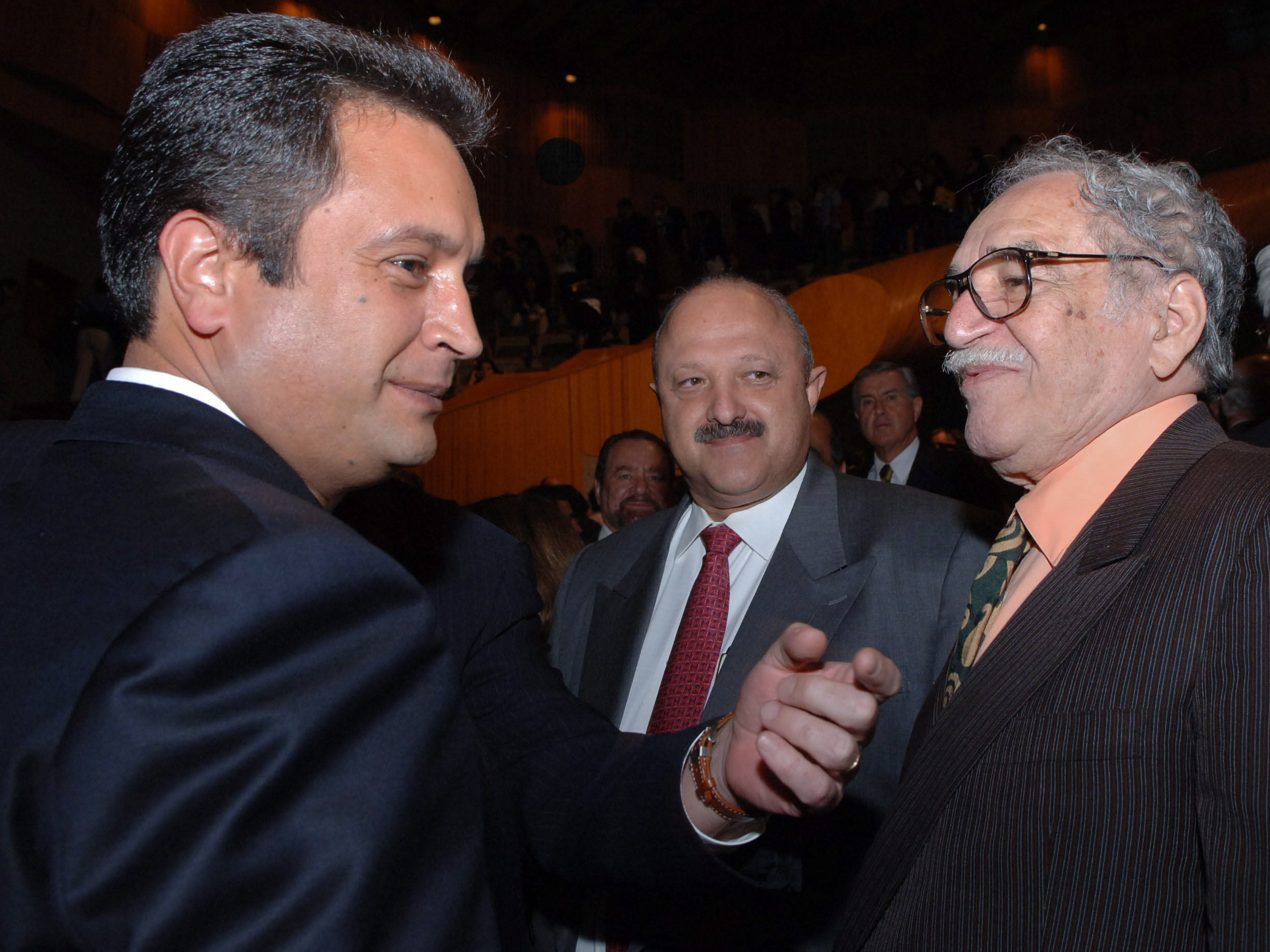 García Márquez, Reyes Tamez y Alejandro Puente